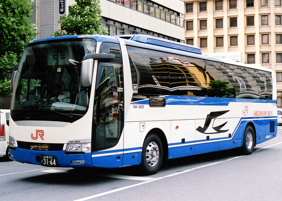 JR東海バス 名神ハイウェイバス 三菱ふそう・エアロエース QRG-MS96VP 直結エアコン車